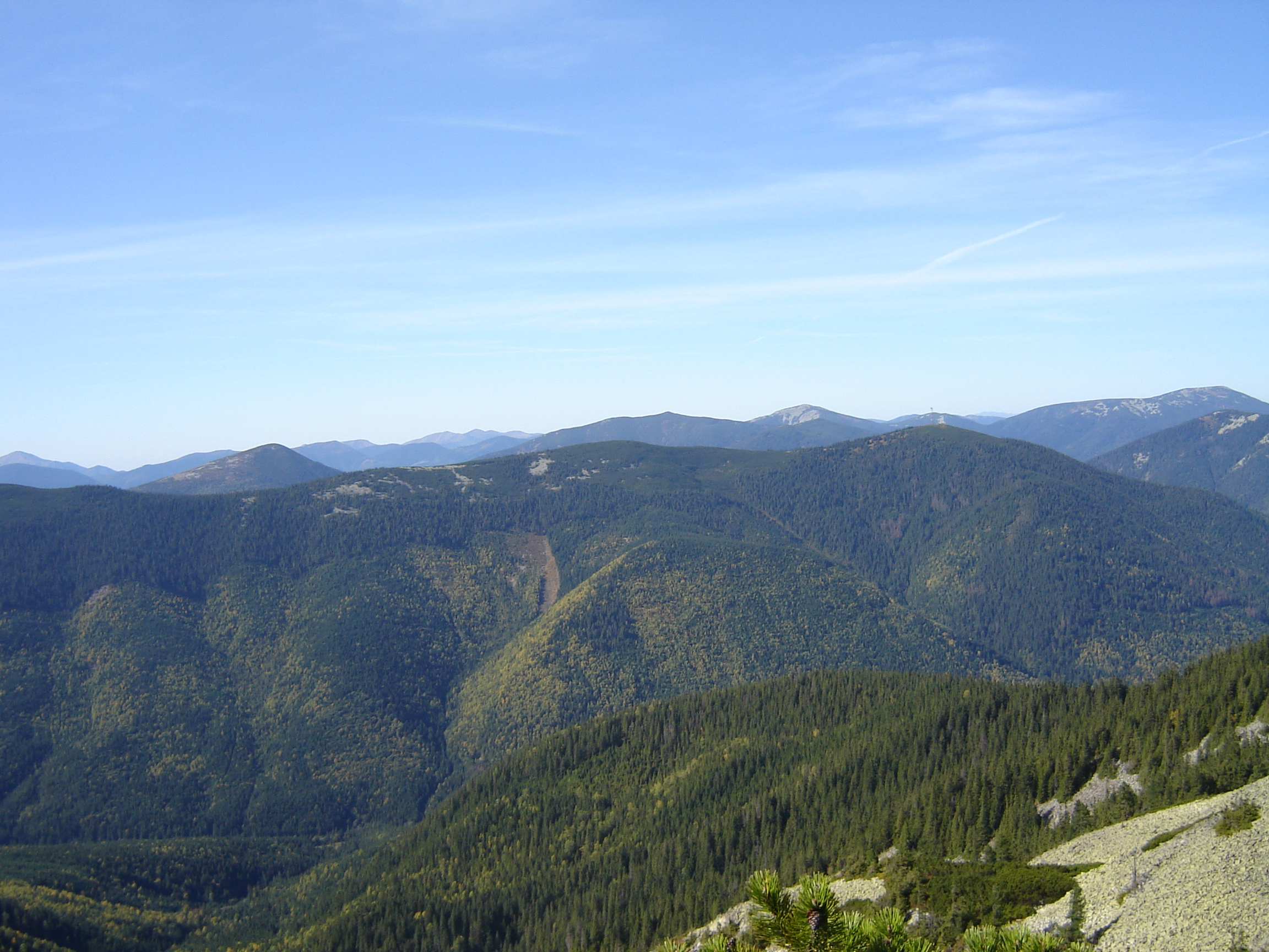 Вид з г. Лопушна